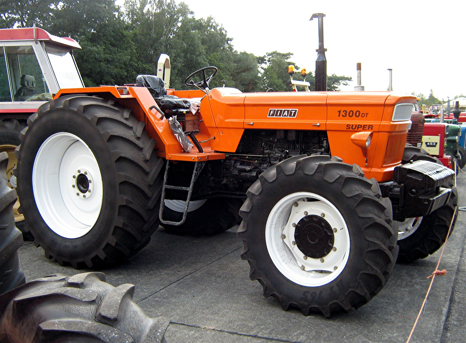 Fiat-Traktor 1300 DT Super, Vliegfeld Weelde, 21. Oldtimer-Festival des Historische Machineclubs Kempen 2009